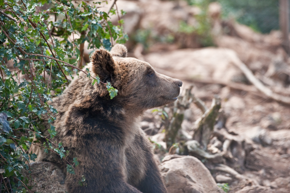 Utočište za medvjediće Kuterevo